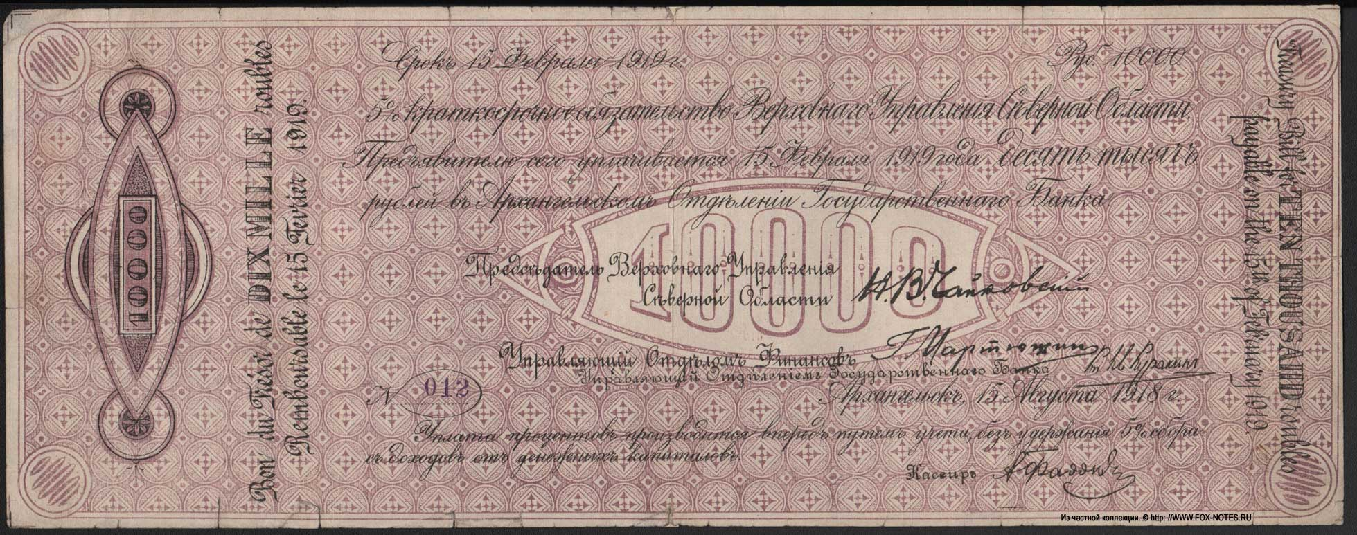 5% краткосрочное обязательство Верховного Управления Северной Области 10000 рублей 1918 г.